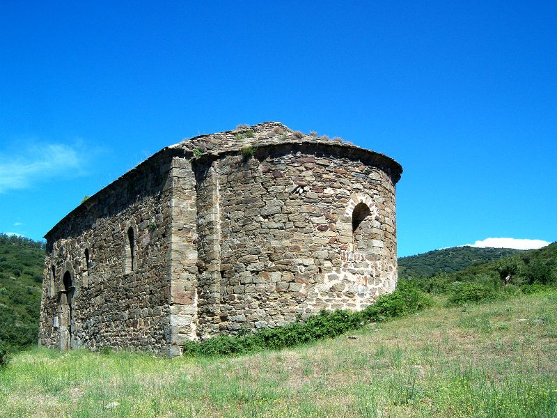 Santa Maria de Colera. Forma part del conjunt monumental del Monestir de Sant Quirze de Colera.